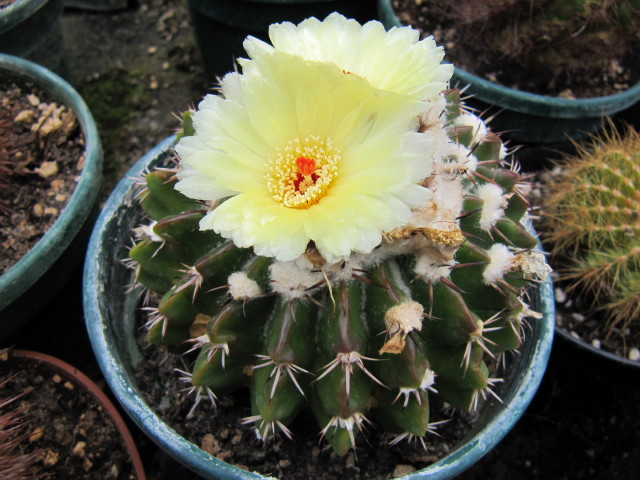 Wigginsia erinacea